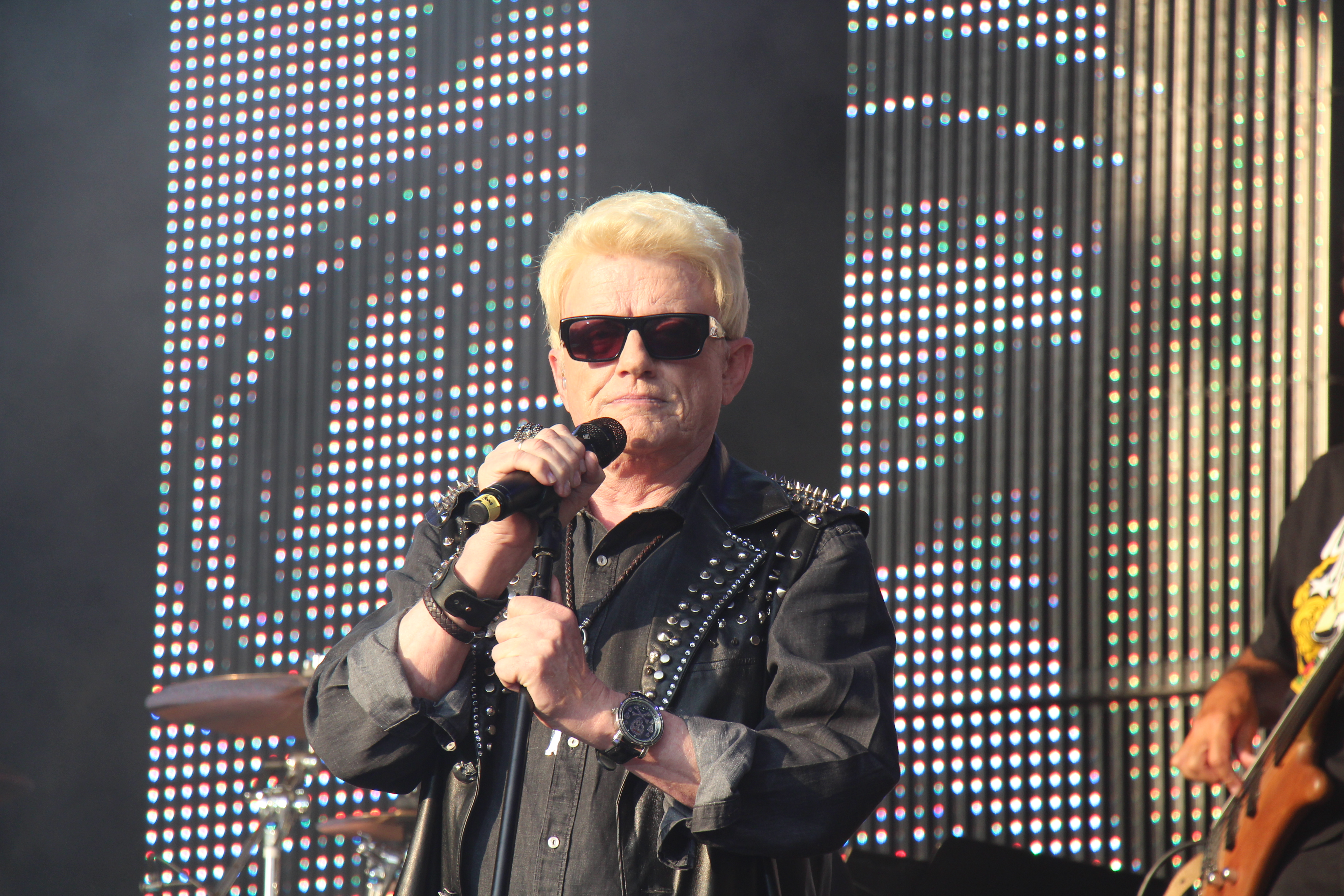 Heino beim Sommernachtstraum 2013 in München beim Olympiapark